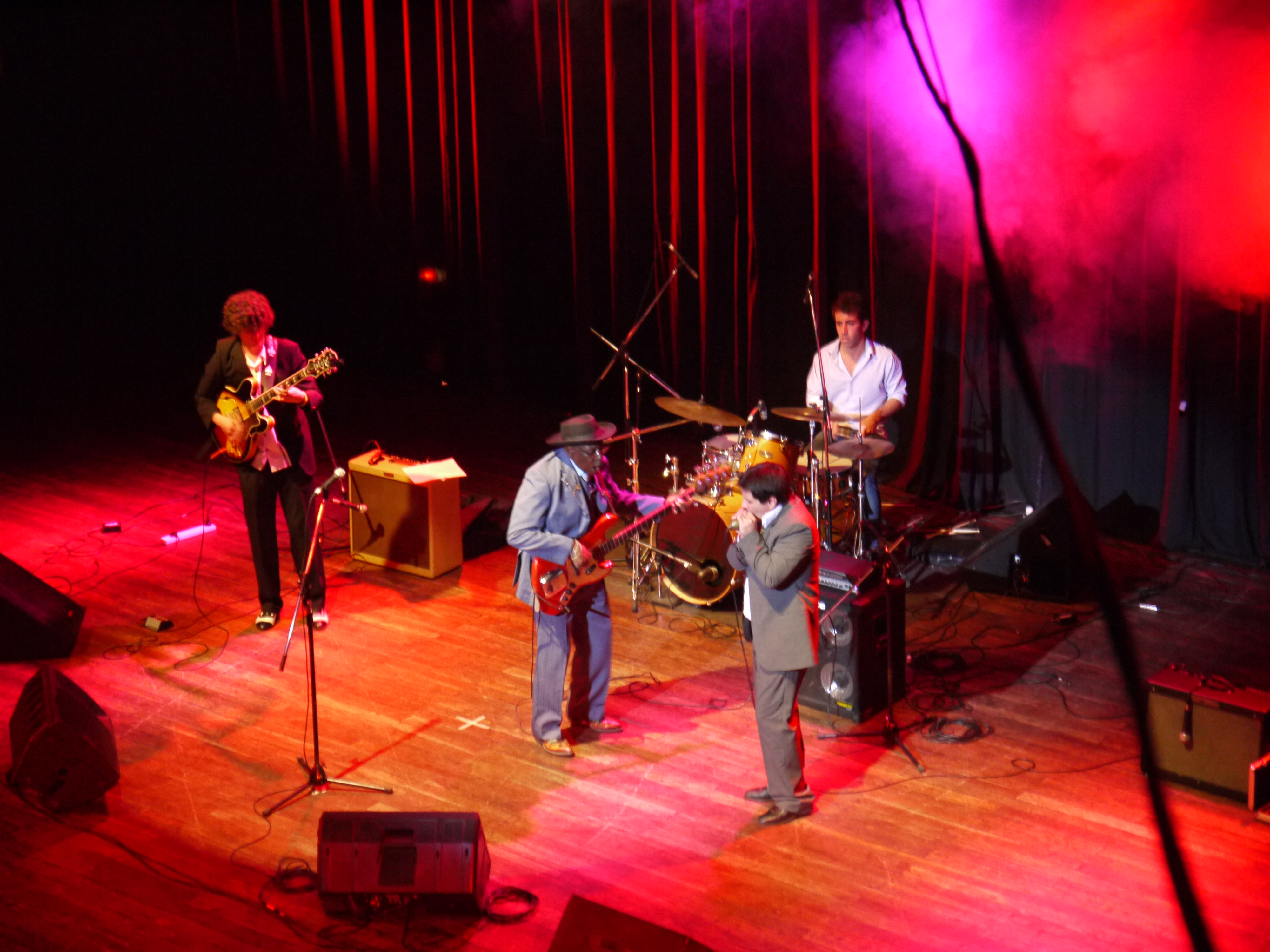 el bajista de blues Bob Stroger durante un concierto en Salta